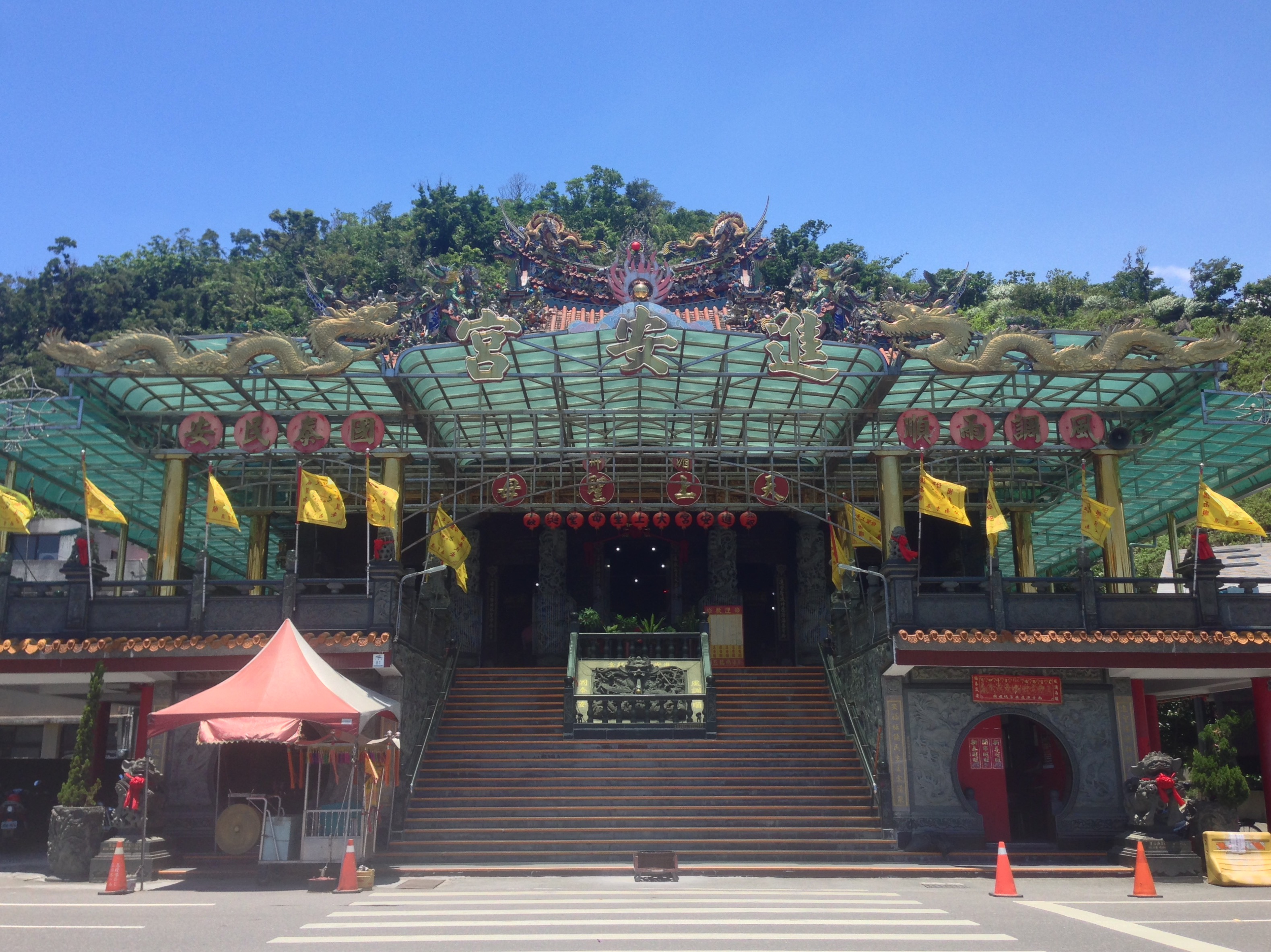 中文（台灣）: 南方澳進安宮正面照